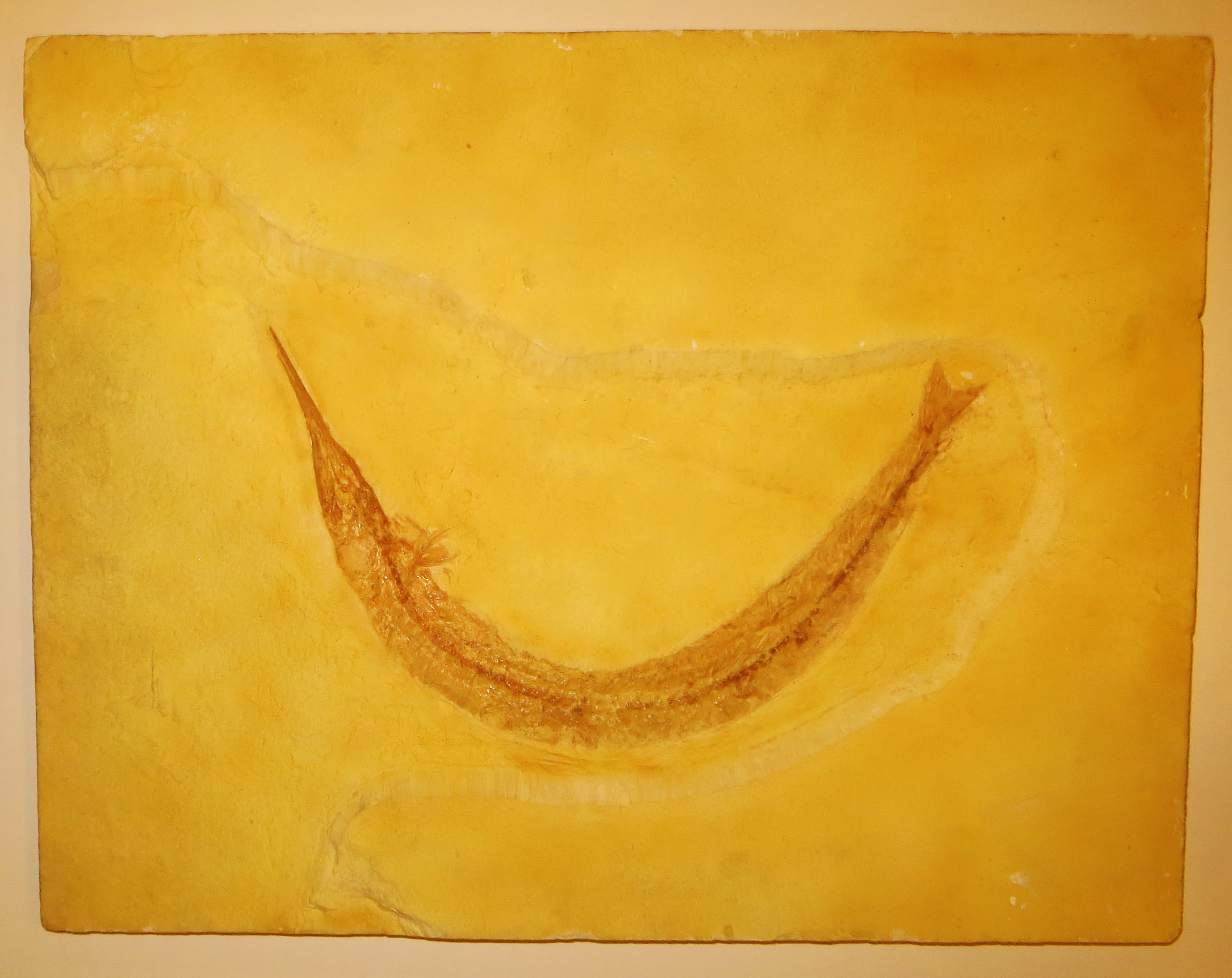 Fossil of Belonostomus- Took the picture at Muse, Trento (Italy)